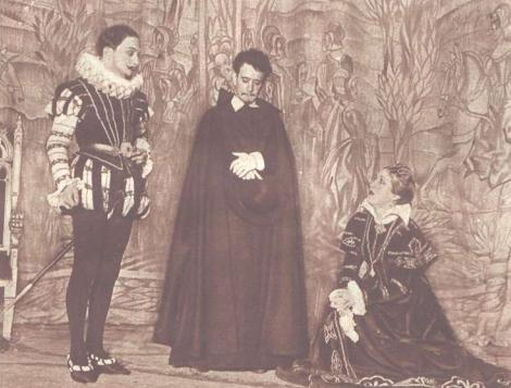 Imagen del estreno de la obra de teatro El divino impaciente, de José María Pemán